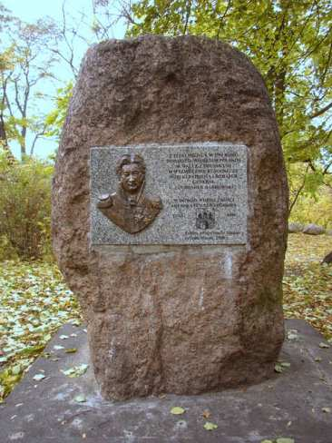 Obelisk gen. Jana Henryka Dąbrowskiego w parku na Szwederowie